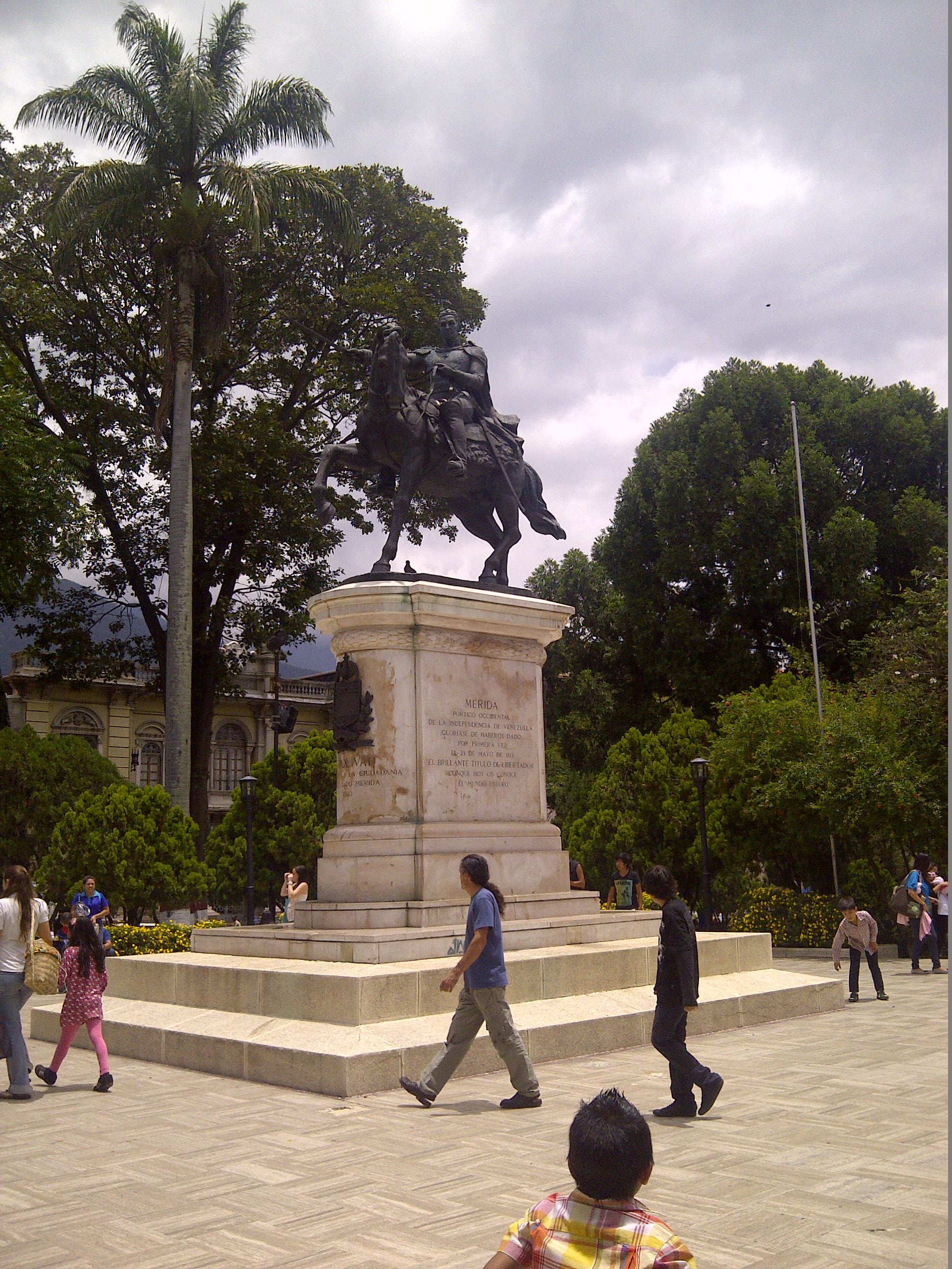 La hermosa plaza Bolívar ubicada en Mérida, Mérida